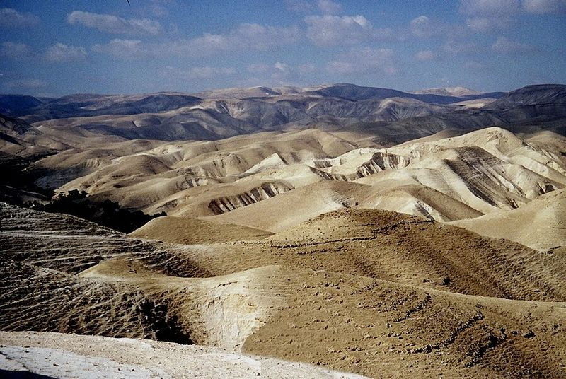 Judean Desert. taken by יואב רוזנברג.